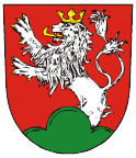 Znak města Lipník nad Bečvou, okres Přerov. V červeném štítě ze zeleného trojvrší vyrůstá doprava hledící stříbrný dvouocasý lev ve skoku, se zlatou korunou, jazykem a zbrojí.